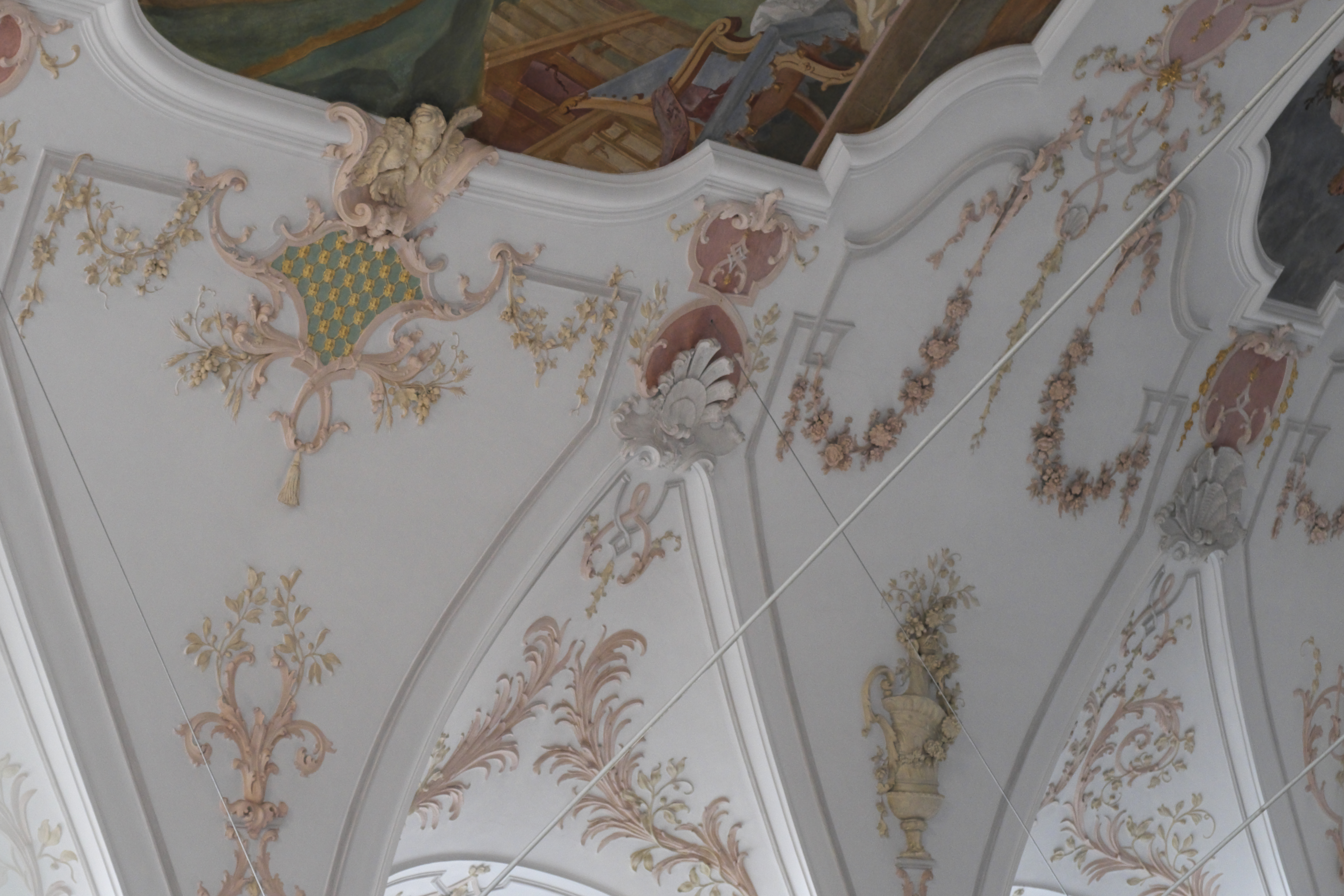 Ehemalige Augustinerchorherren-Stiftskirche, jetzt Pfarrkirche St. Johann Baptist, in Beyharting (Tuntenhausen) im Landkreis Rosenheim (Bayern/Deutschland), Stuckdekor